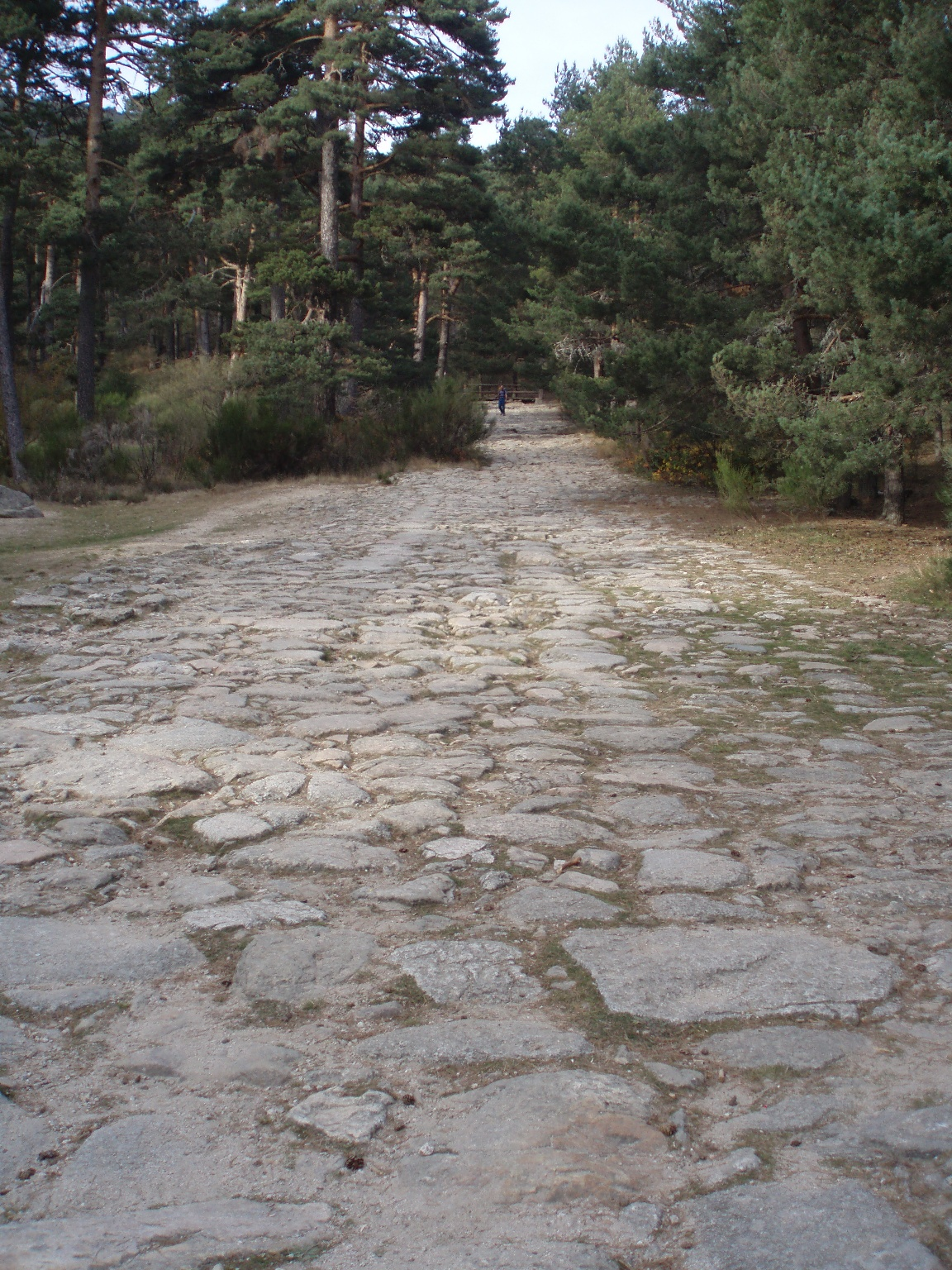 Calzada romana de la Fuenfría (España).